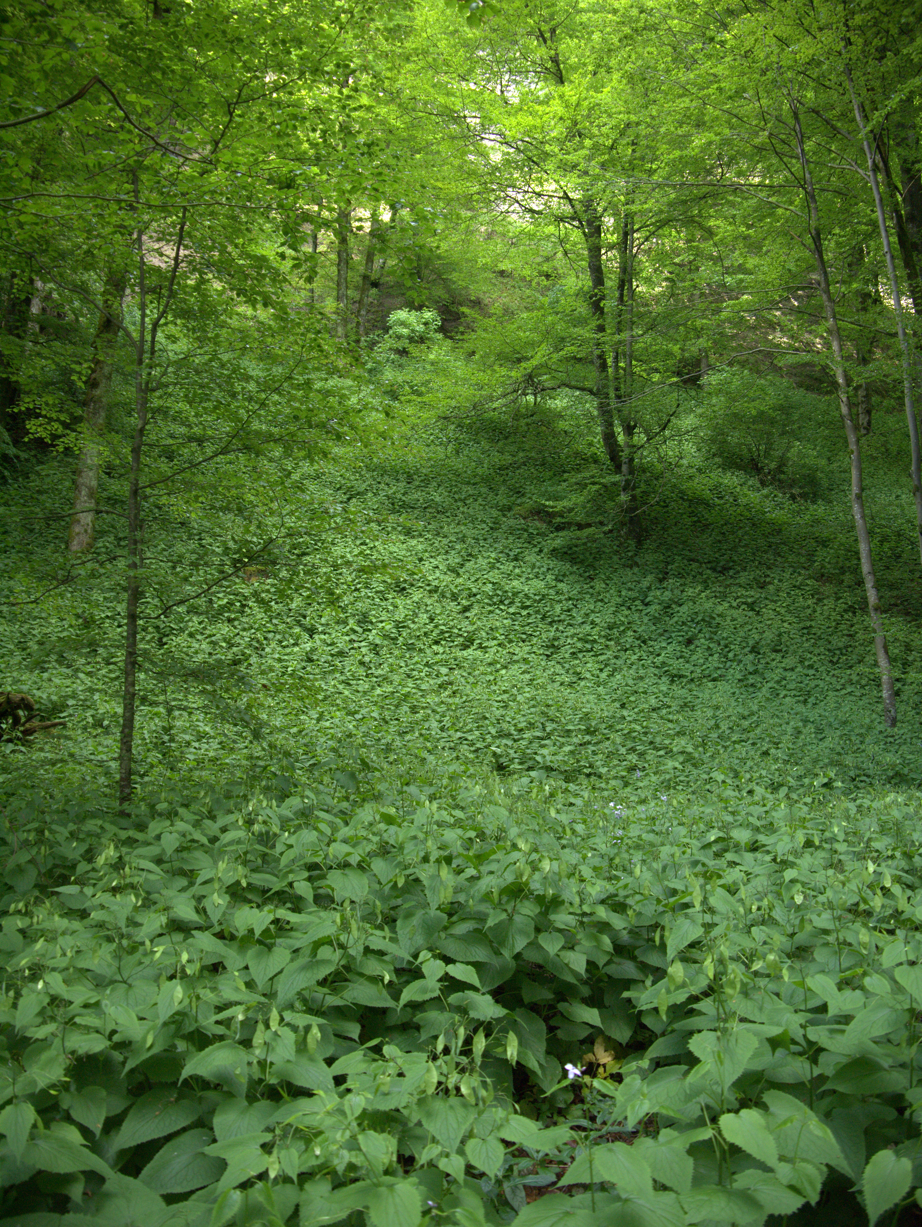 Hobelsberg-Riesn Feld mit Lunaria-Pflanzen This media shows the nature reserve in Upper Austria with the ID n143.